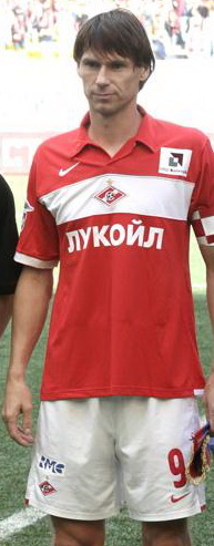 Egor Titov